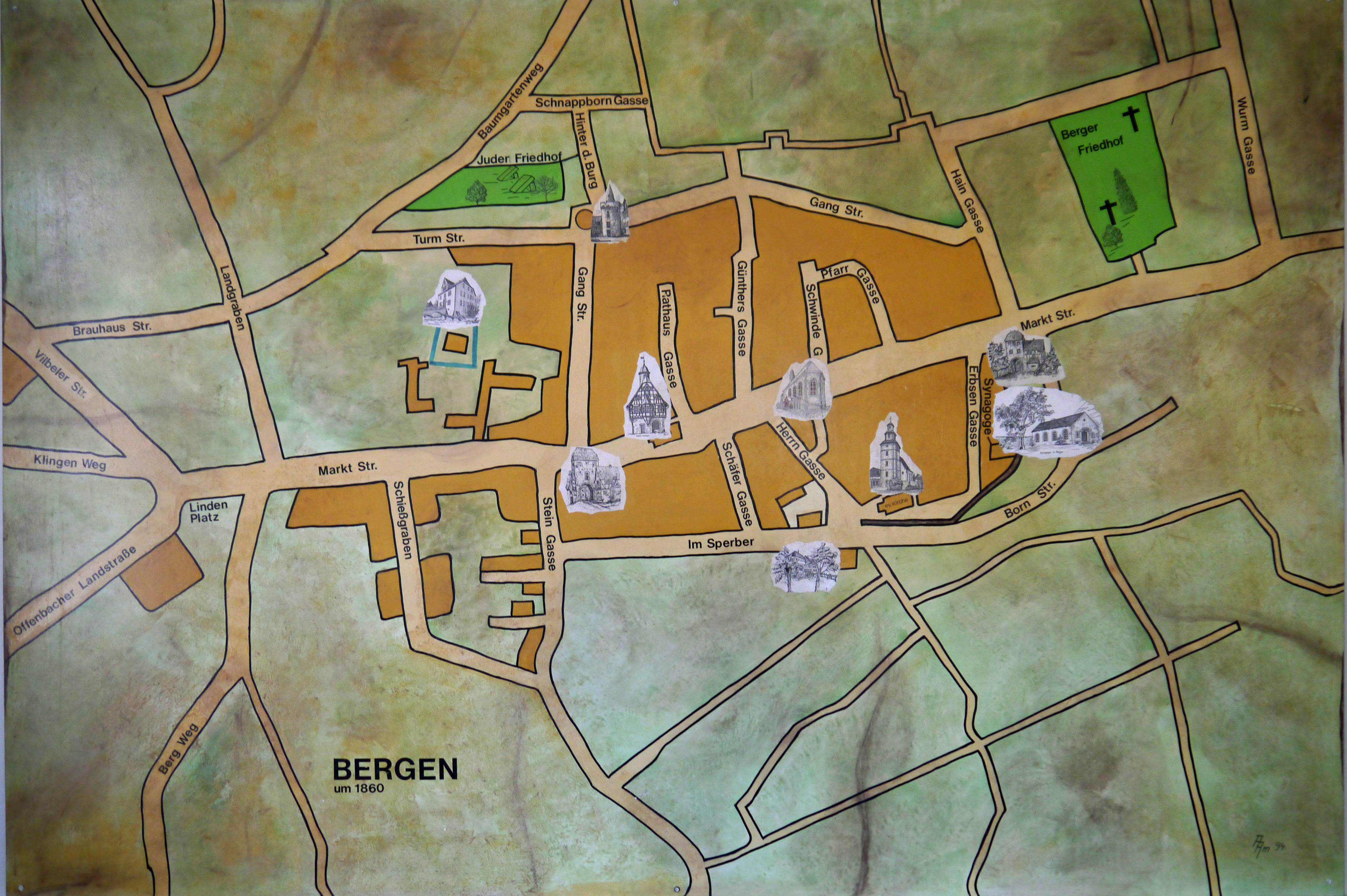 Karte von Bergen um 1860. In der Ausstellung der jüdischen Gemeinde Bergen Enkheim.